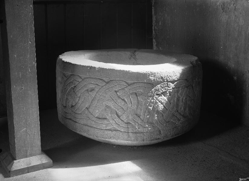 Dopfuntscuppa, ornerad. Kategori: (04) DopfuntarDopfuntscuppa, ornerad.